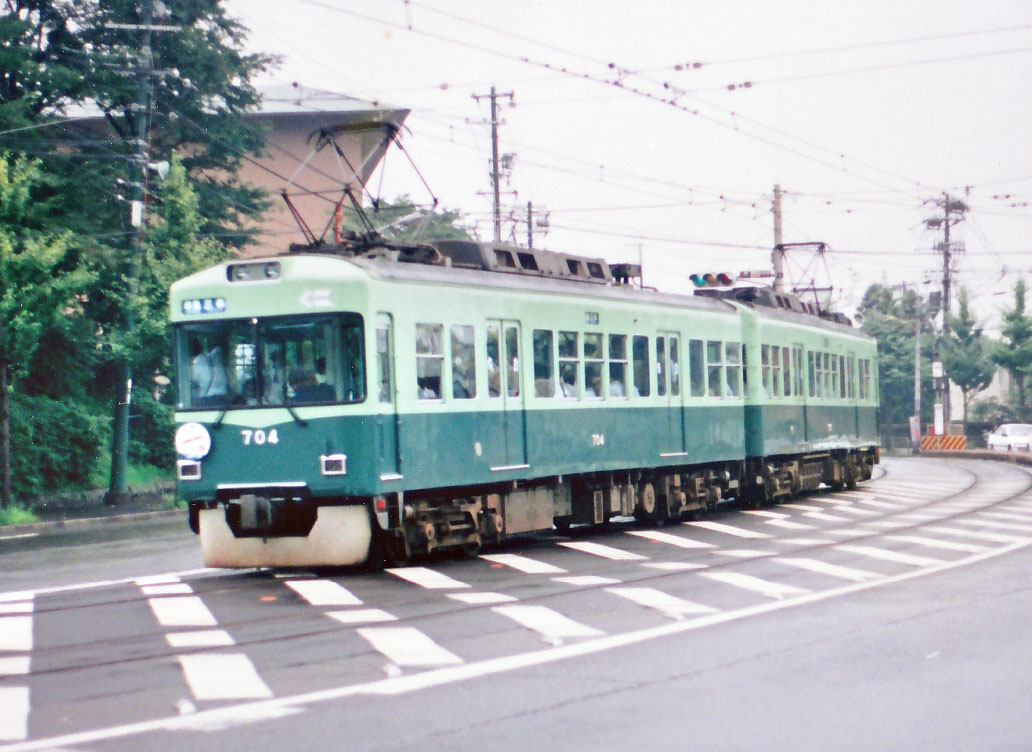 地上時代の蹴上駅を通過する京阪700系 当時の写真よりスキャナー読み込み。